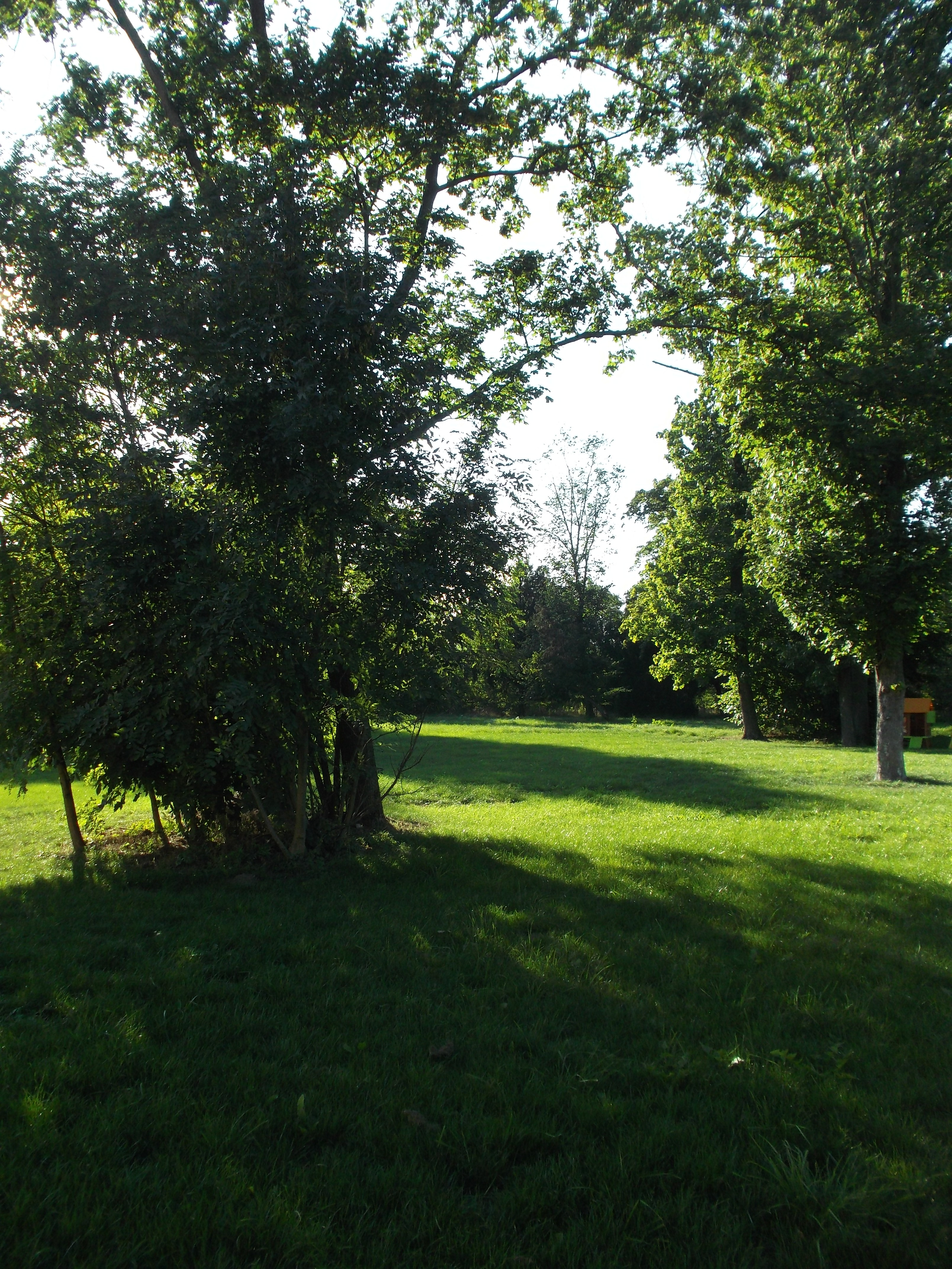 Park